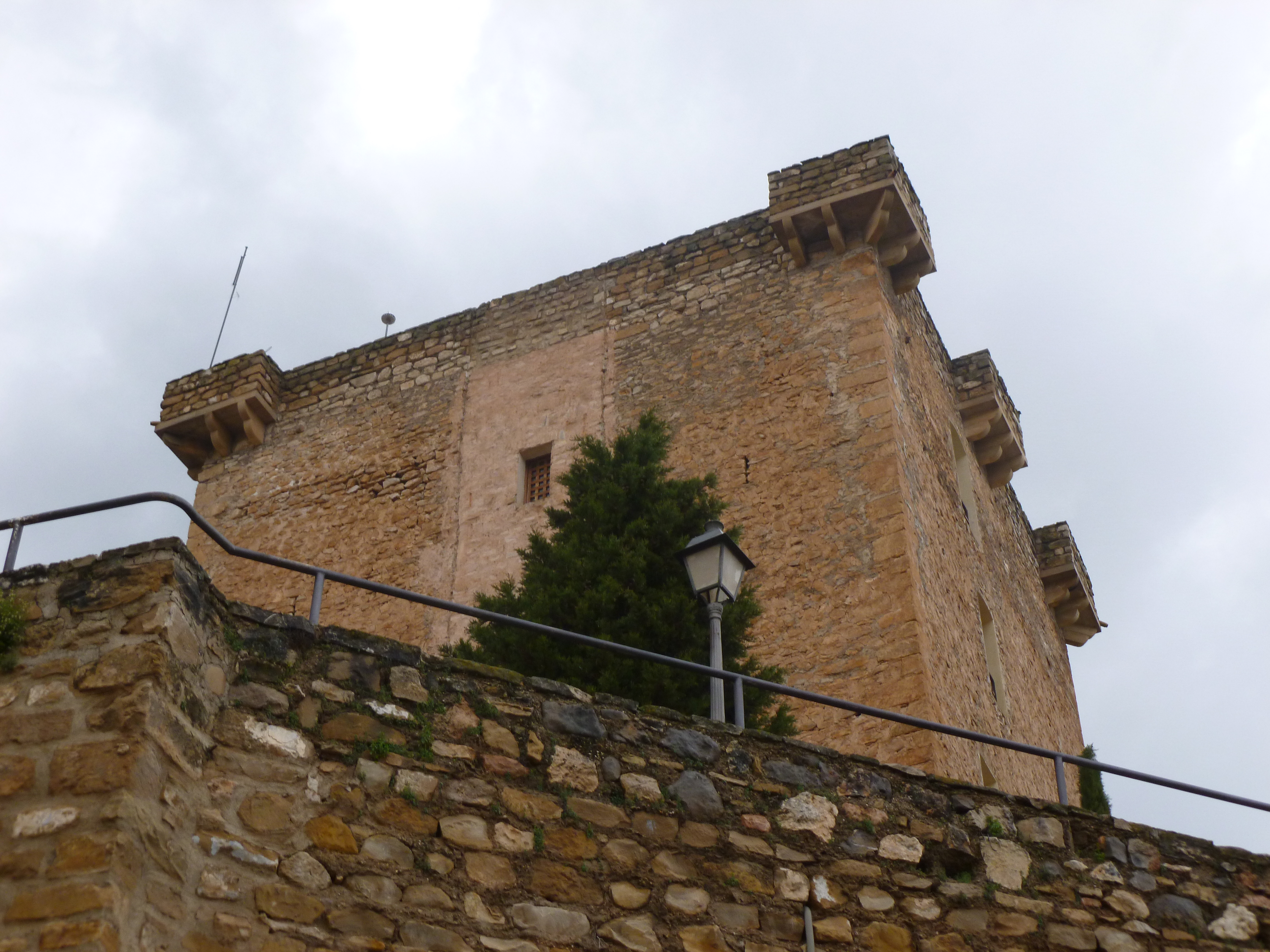 Castell de Jódar, a la província de Jaén (Espanya)